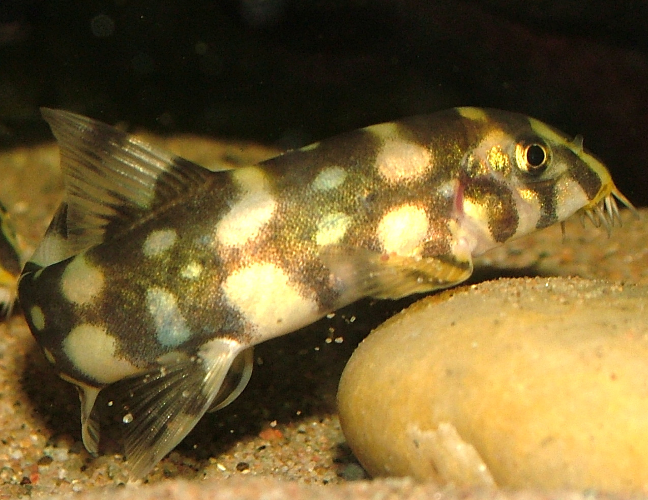 Botia kubotai at around 2""